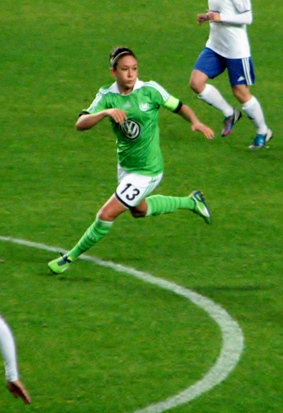 Nadine Keßler mängimas VfL Wolfsburgi ridades Pärnu JK vastu